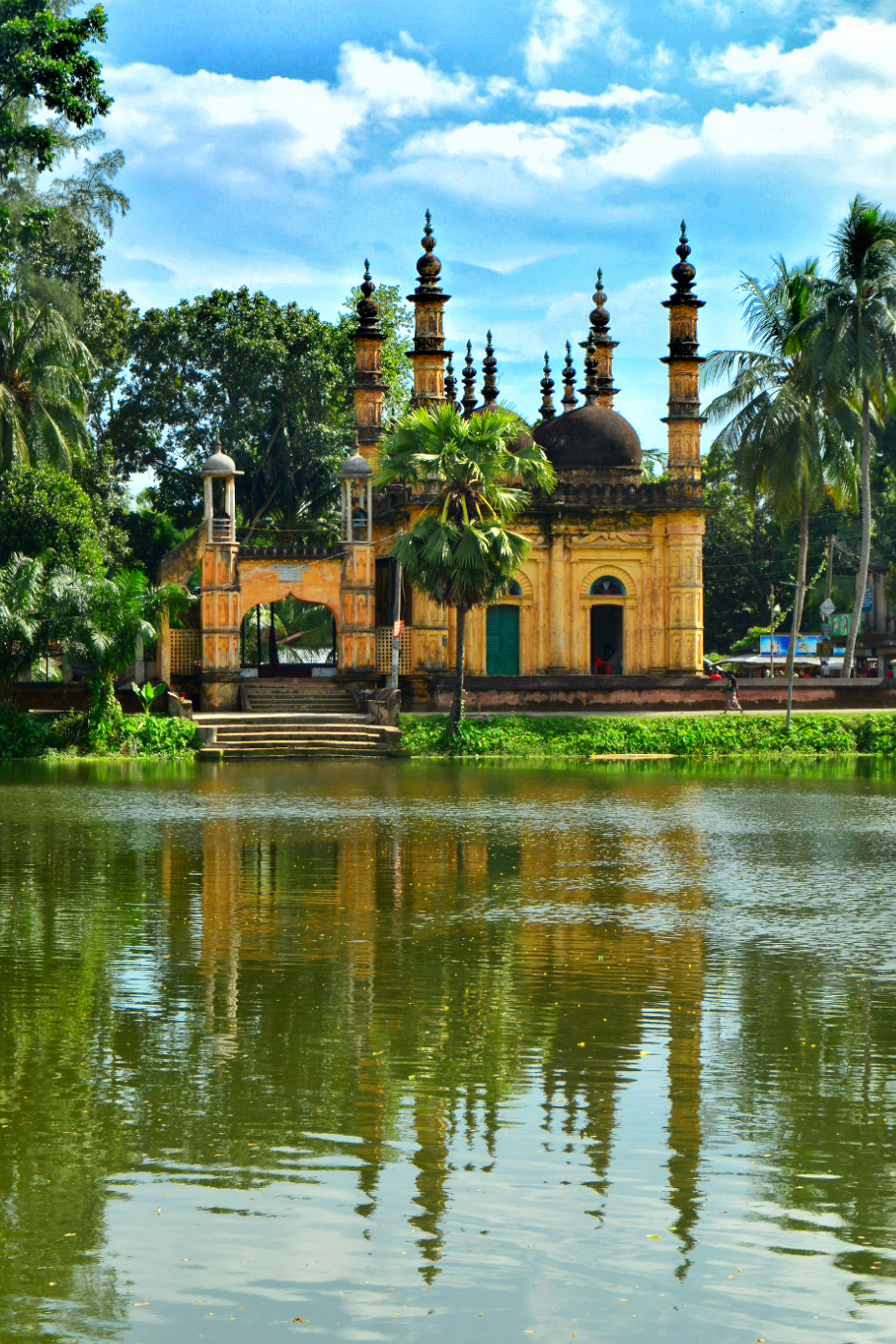 তেতুলিয়া জামে মসজিদ তালা সাতক্ষীরা '